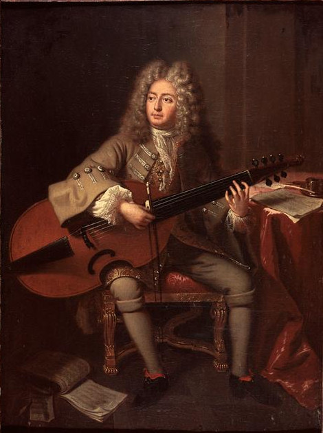 Retrato do compositor francês e virtuose da viola da gamba, Marin Marais.